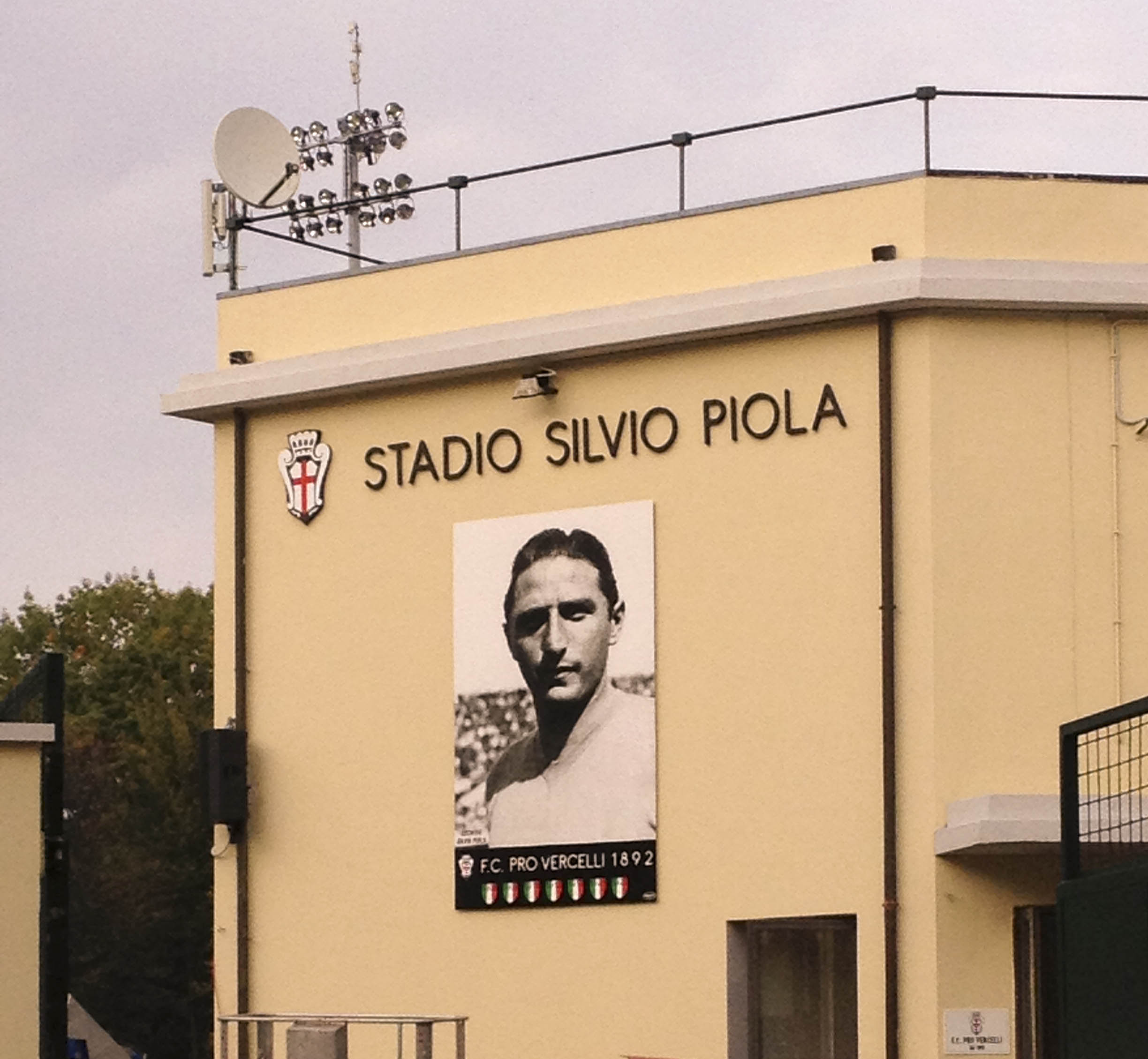 Poster raffigurante il calciatore Silvio Piola, affisso su una parete esterna dello stadio di Vercelli